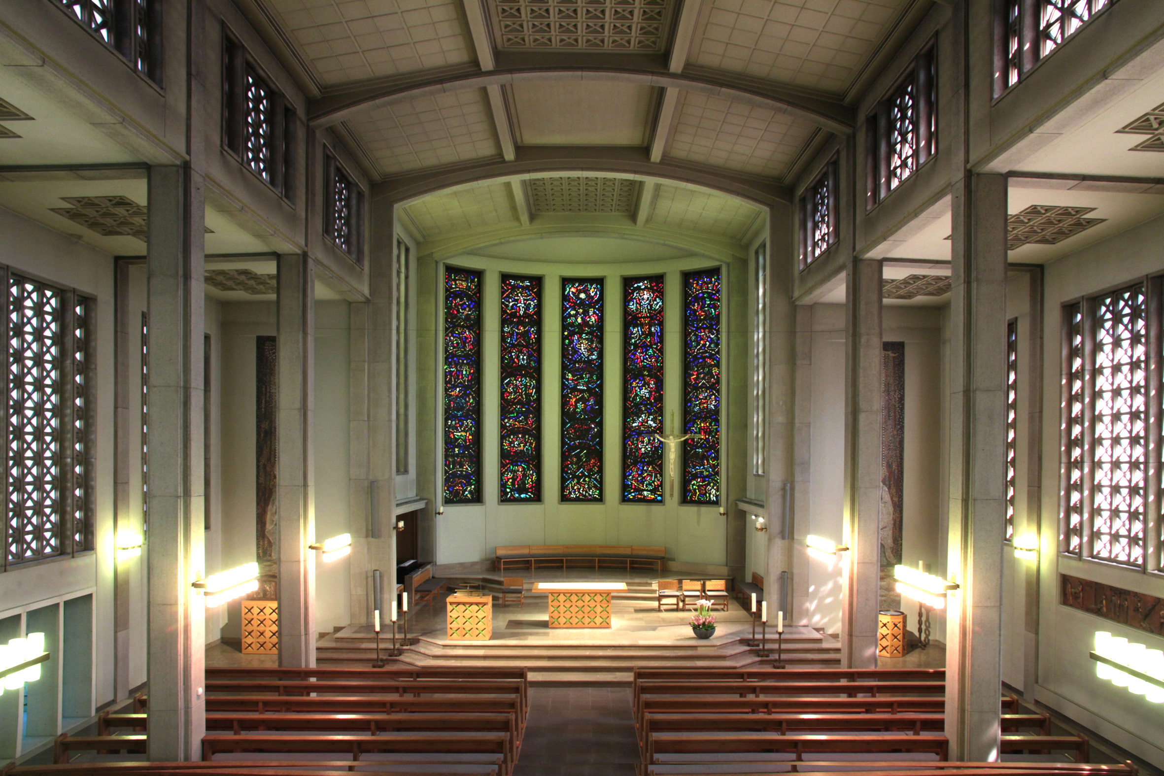 Römisch-katholische Kirche Dreikönigen Zürich-Enge, Altarraum von Frédéric Dedelley